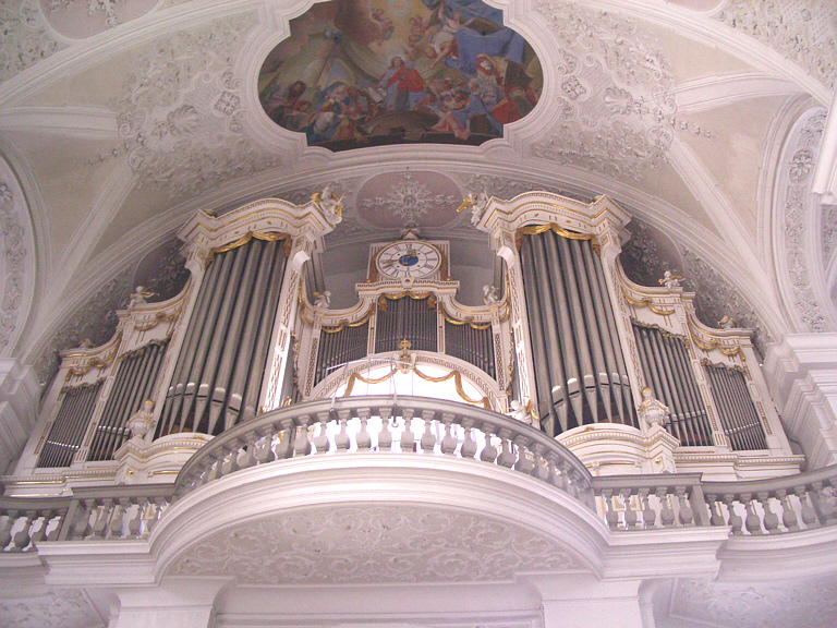 Ravensburg, ehem. Klosterkirche Weißenau, Holzhey-Orgel